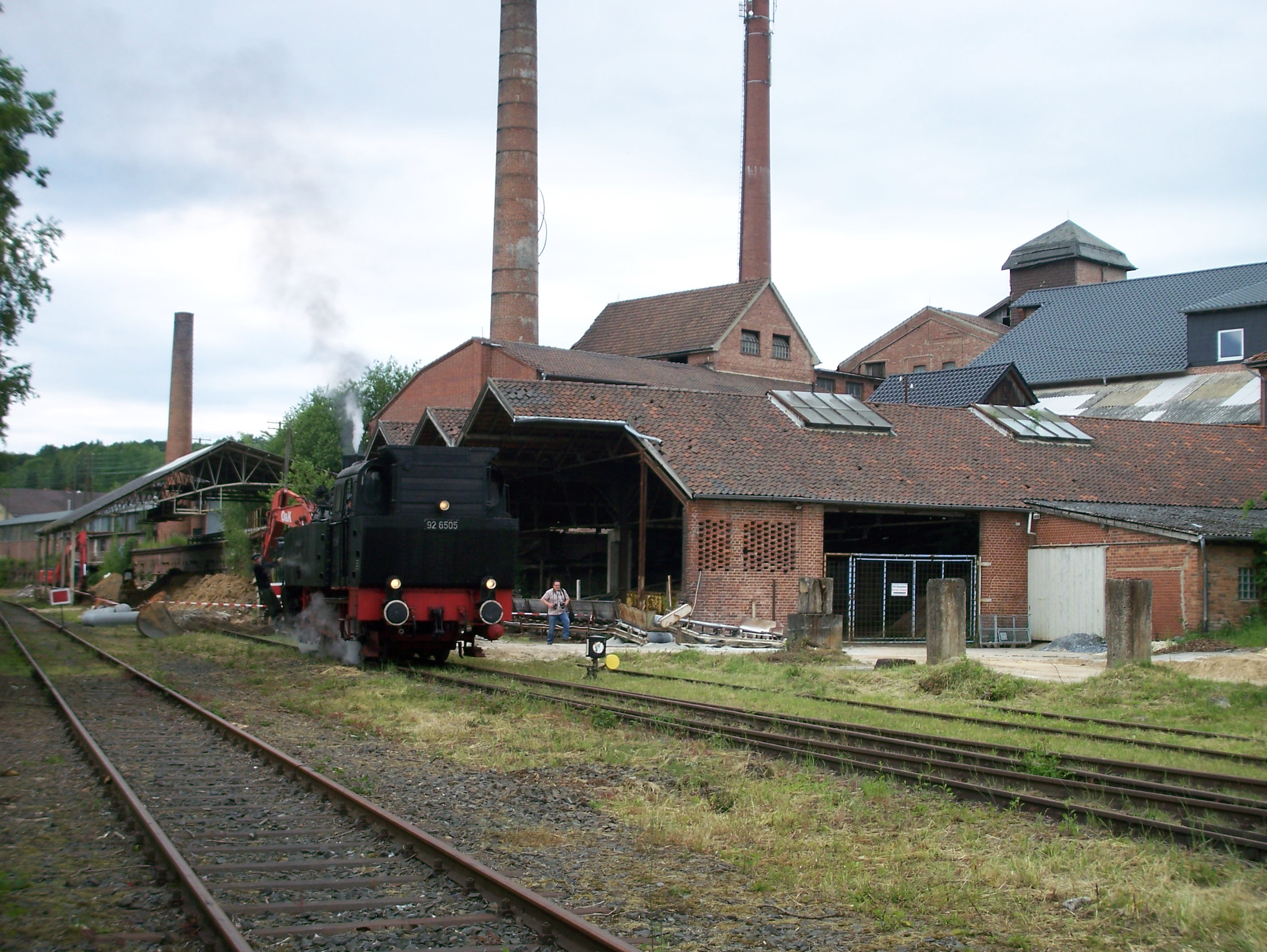 Dampflok Emil Mayrisch N.3 in Dörentrup, Bahnstrecke Hameln-Lage (Begatalbahn).